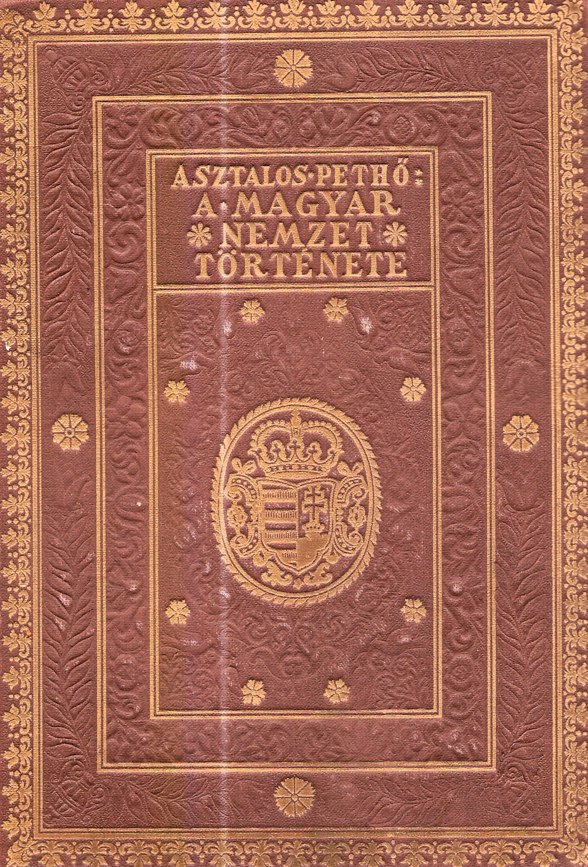 Asztalos Miklós - Pethő Sándor: A magyar nemzet története (1934, a borító készítője nem ismert)